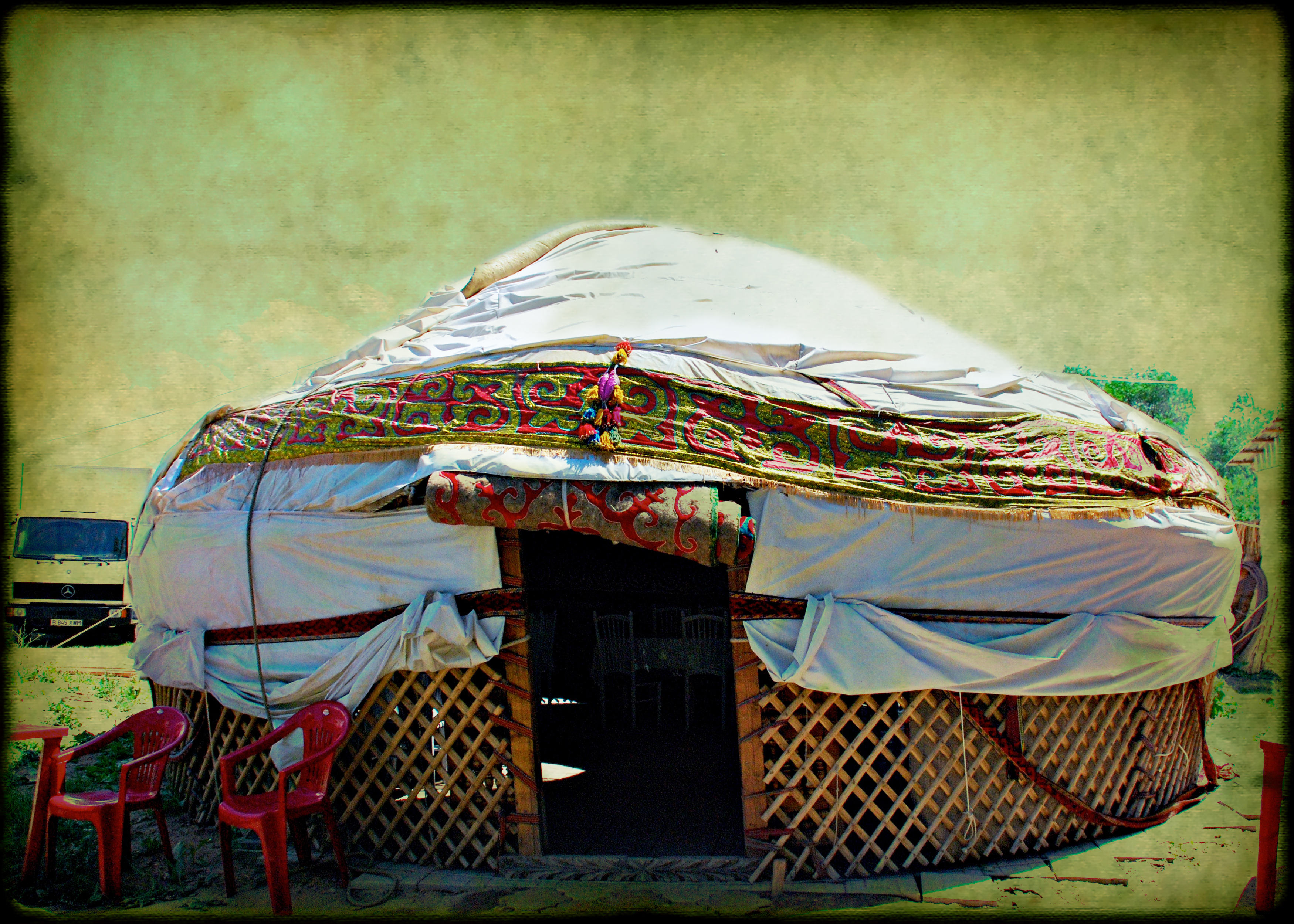 obrazek przedstawiający jurtę English | Polski | +/−